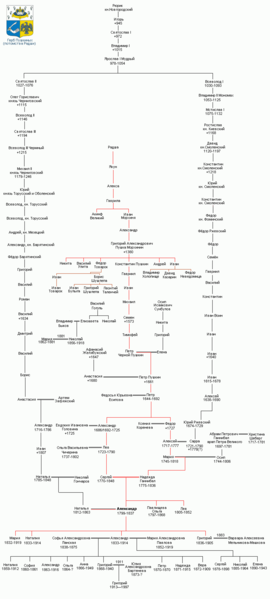 Родовод Пушкина А.С.